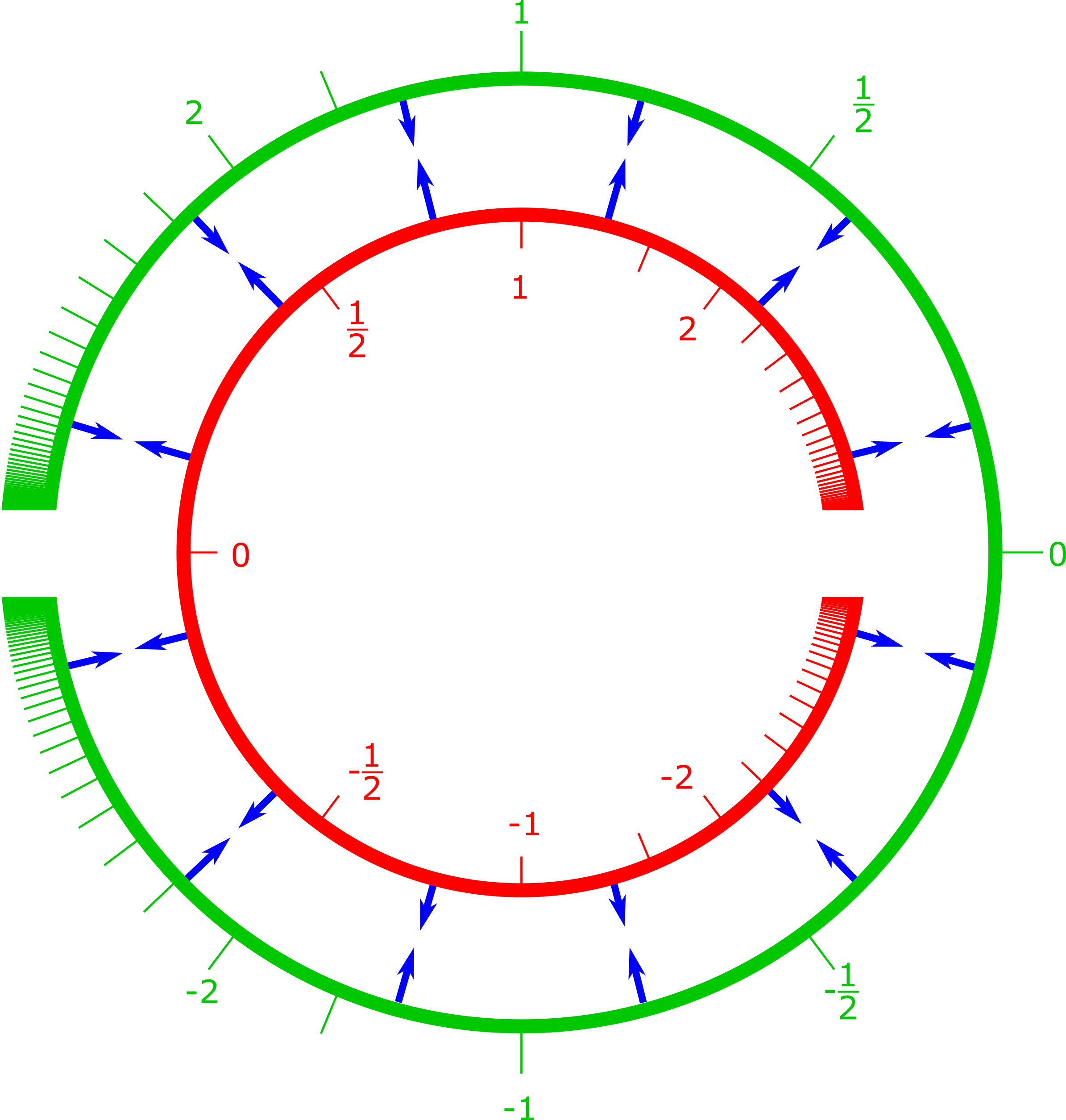 הישר הפרויקטיבי המתקבל מהדבקה של שניישרים אפיניים